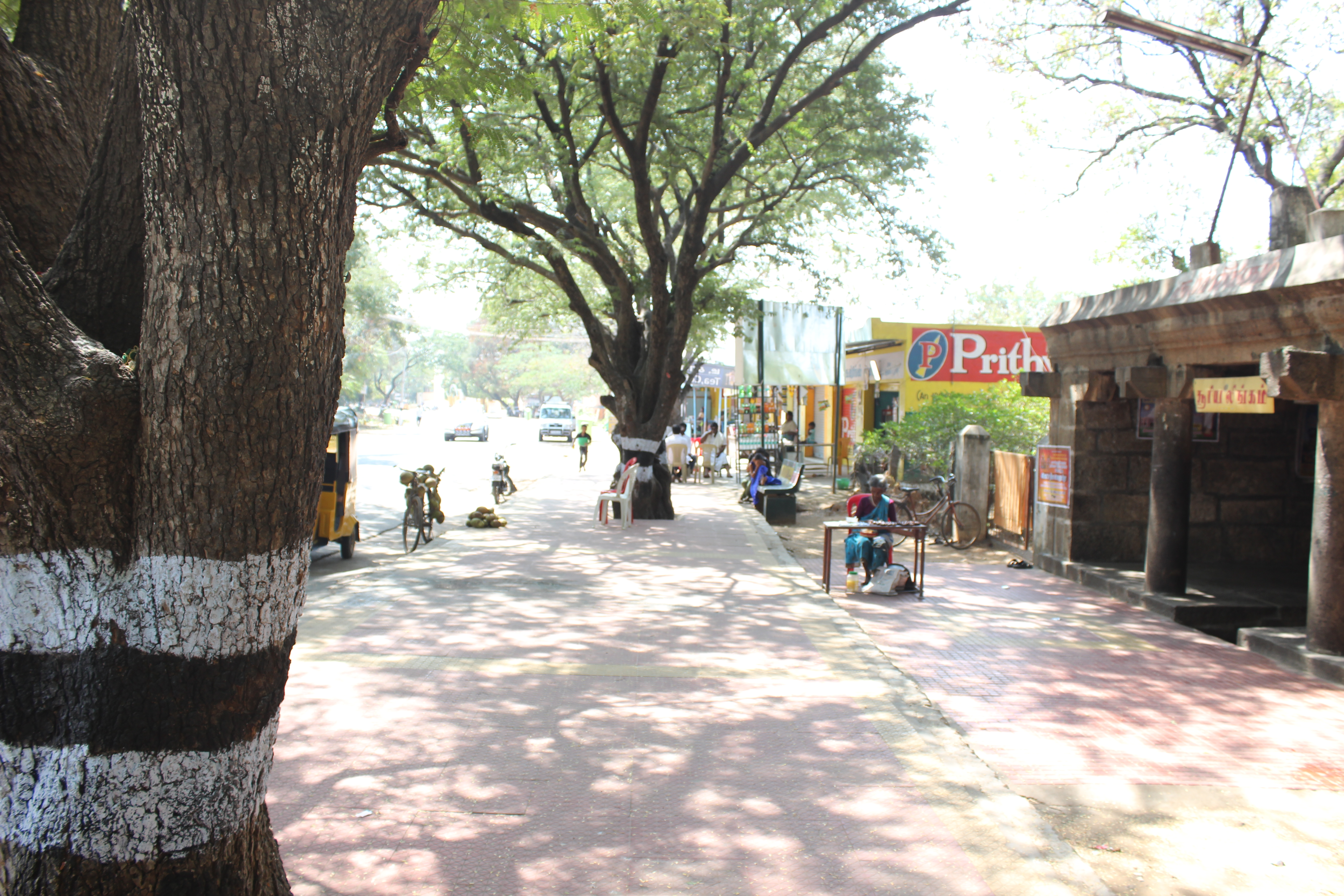 கிரிவலம், திருவண்ணாமலை